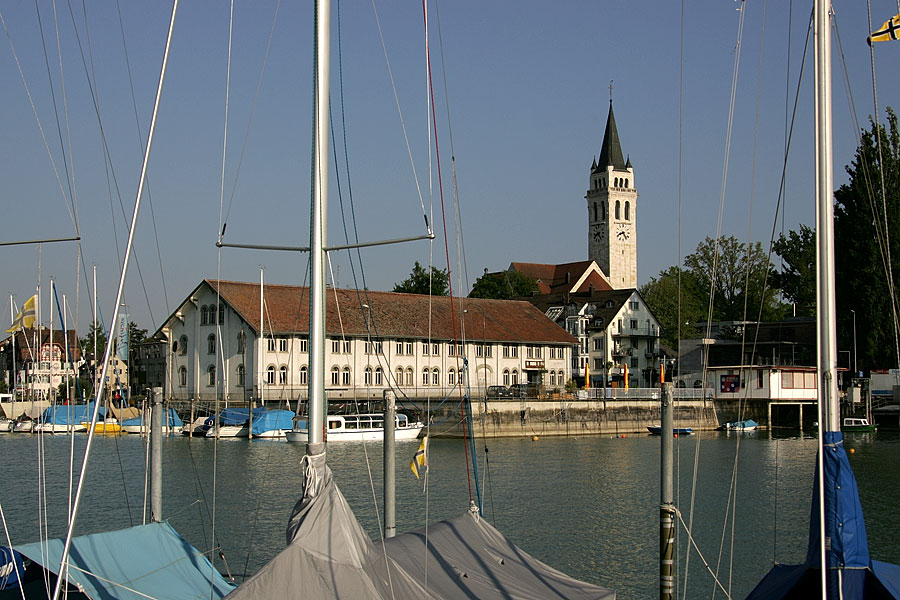 Seehafen von Romanshorn mit Katholischer Kirche und "Museum am Hafen" in der Bildmitte.